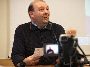 il filosofo Mauro Mantovani durante un convegno a Roma presso la Università Pontificia Salesiana nel 2013